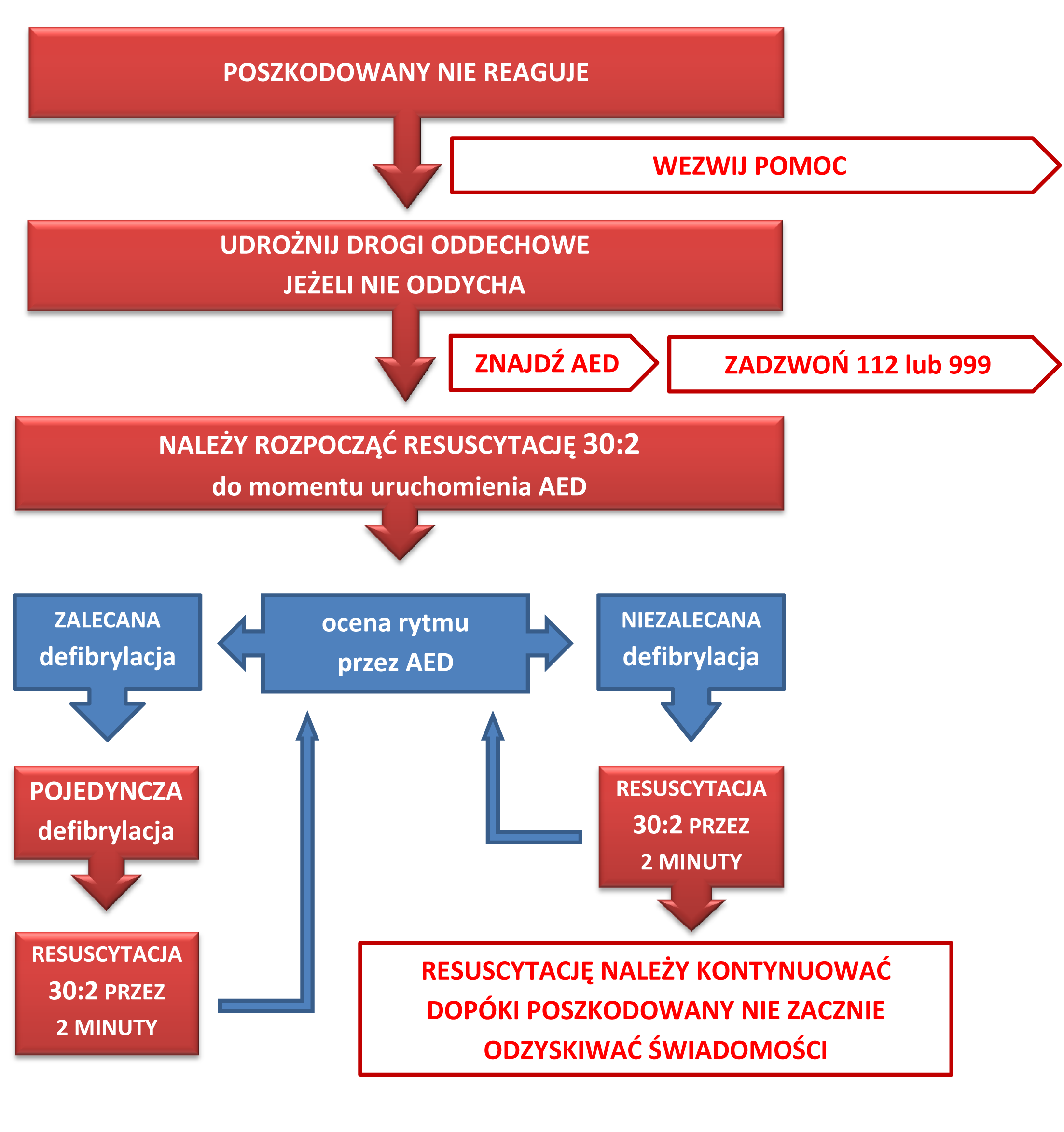 Schemat blokowy podstępowania przy użyciu AED wg wytycznych ERC